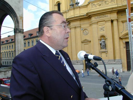 Heinrich Traublinger bei einer Ansprache bei einer Handwerkerdemo auf dem Odeonsplatz vor der Feldherrn-Halle in München